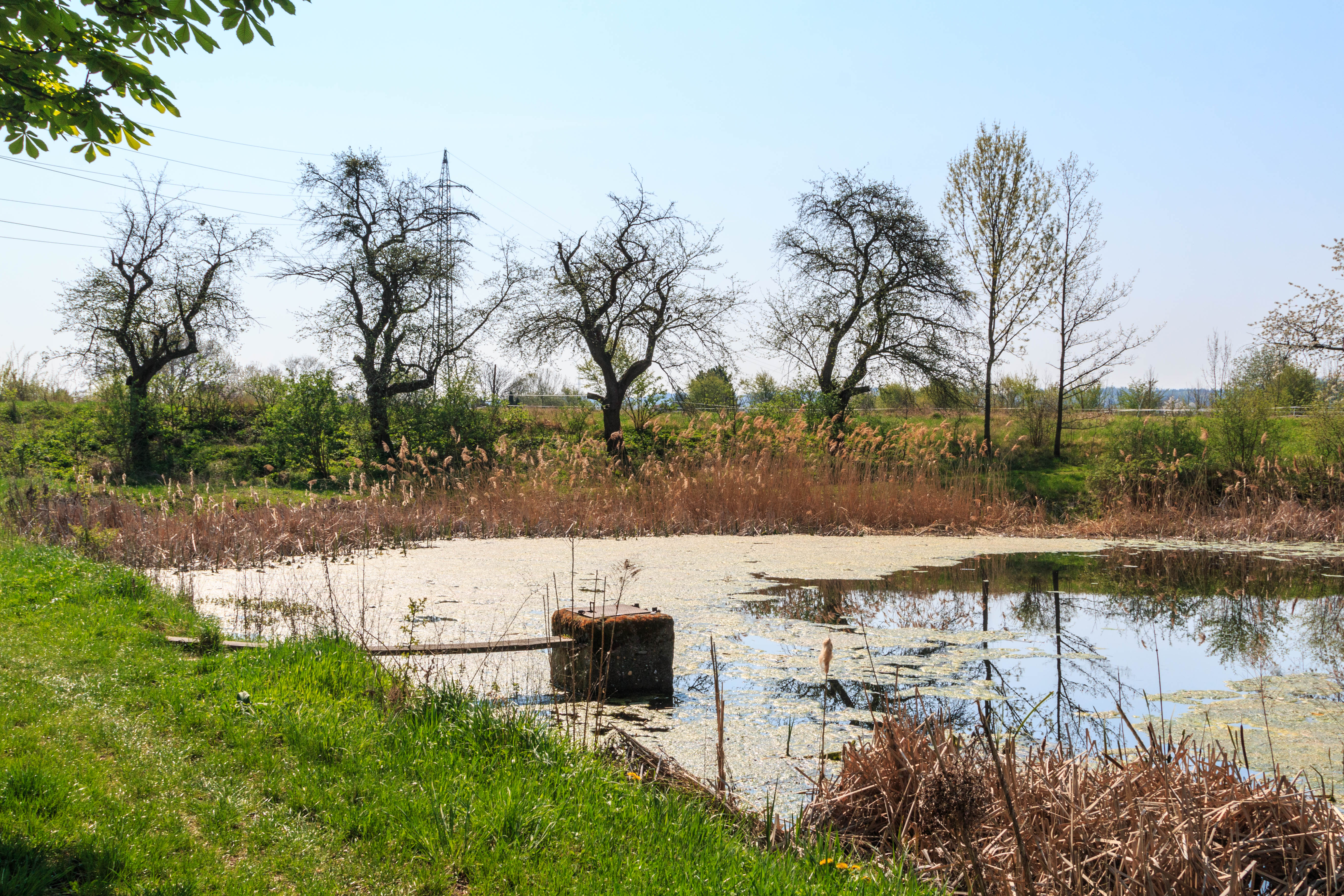 Rybník Marešák u Choltic Project: Vodstvo.